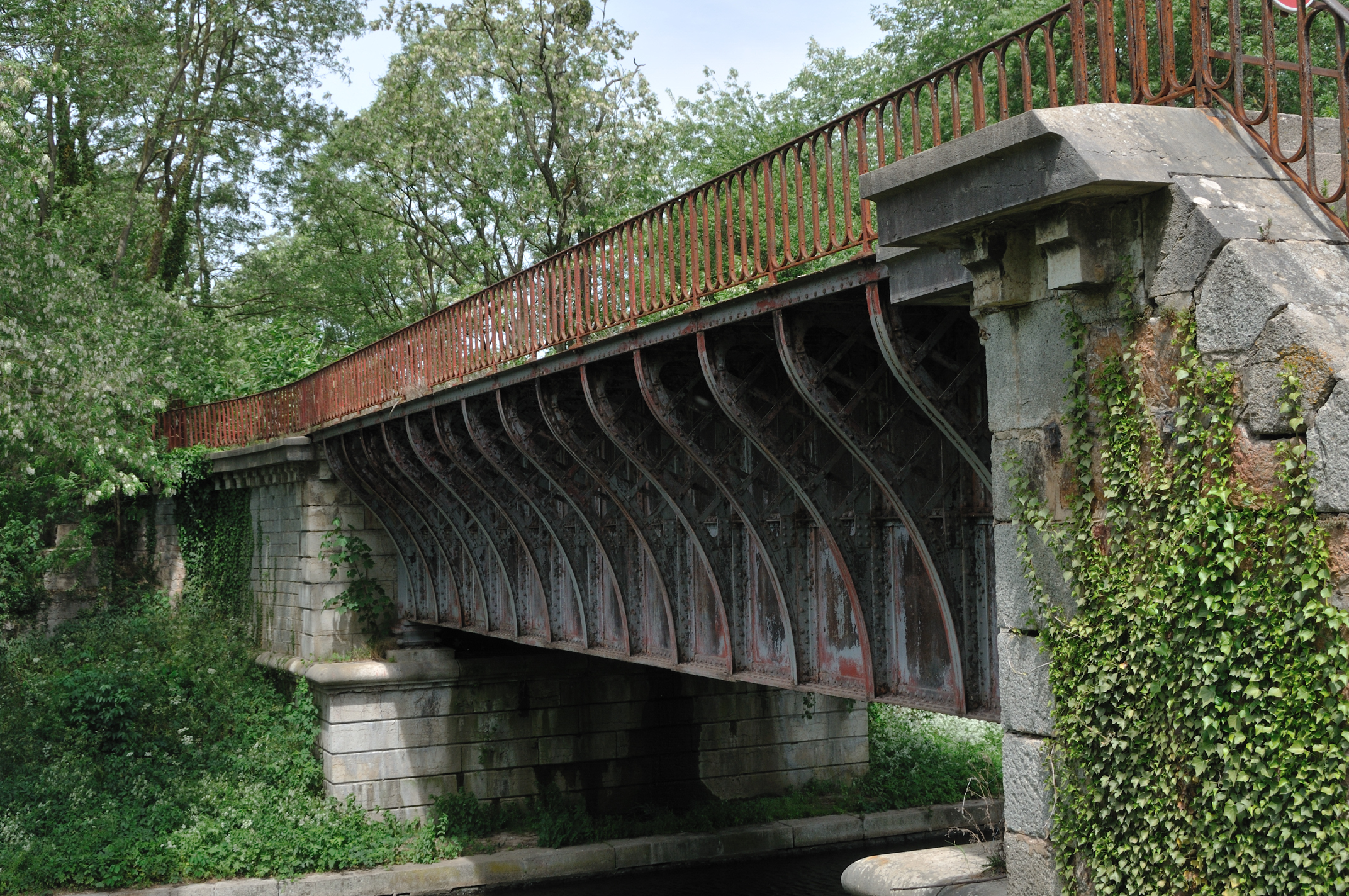 Pont-rivière de l'Oudan, Roanne, Loire, France